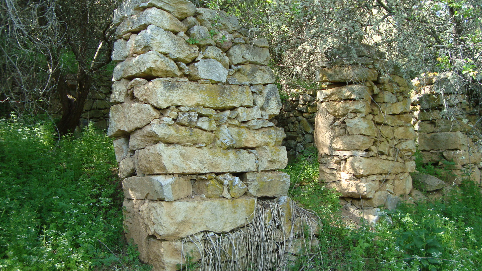 Развалини от първото училище в Западните покрайнини от 1778 г., построено от Тричко Гусин